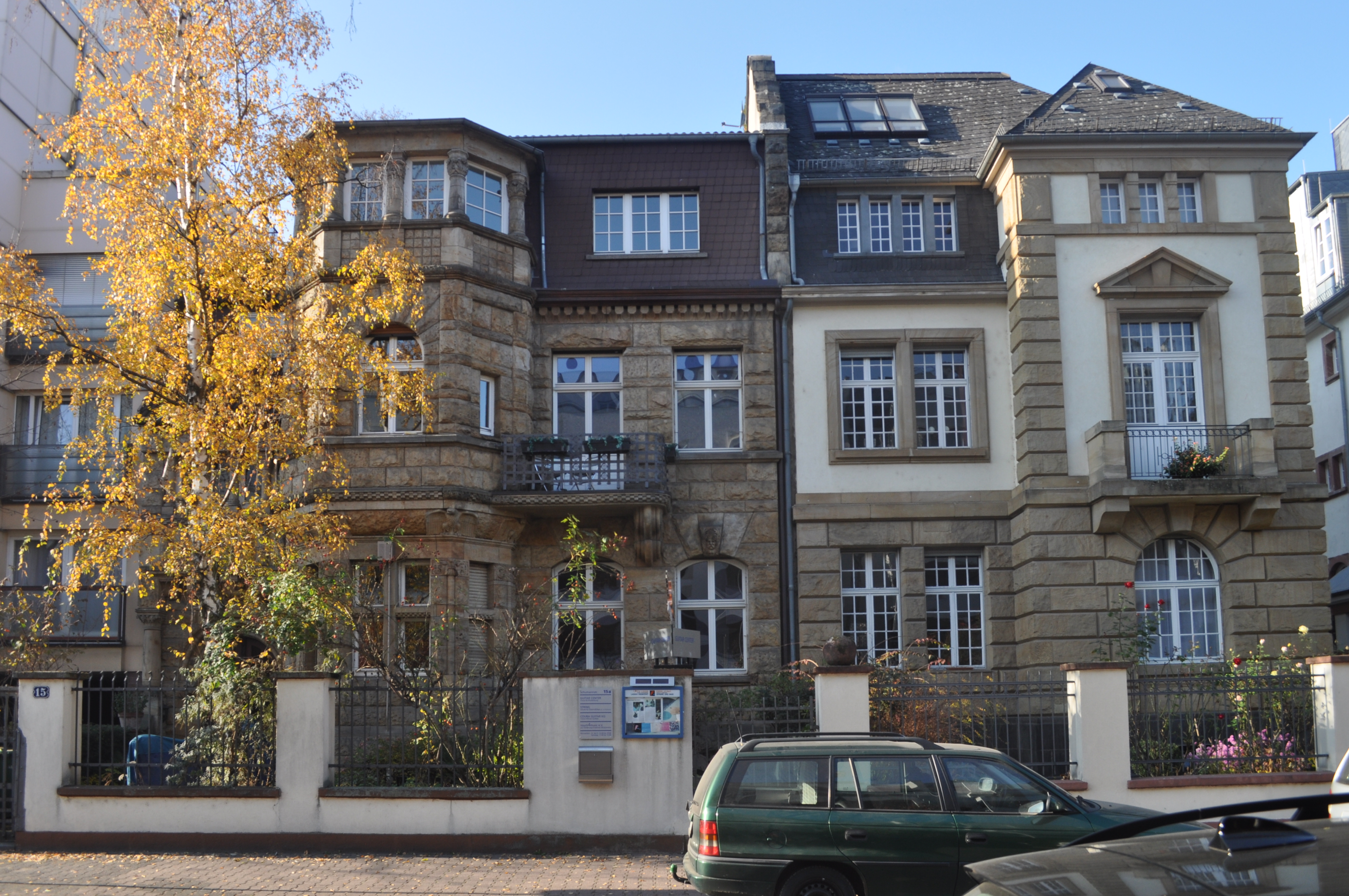 Denkmalgeschütztes Haus Schumannstraße 15 in Frankfurt; Architekt Julius Lönholdt